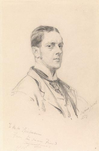 Self-portrait